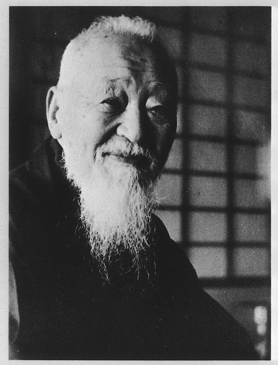 Portrait of Masuda Takashi (益田孝, 1848 – 1938)